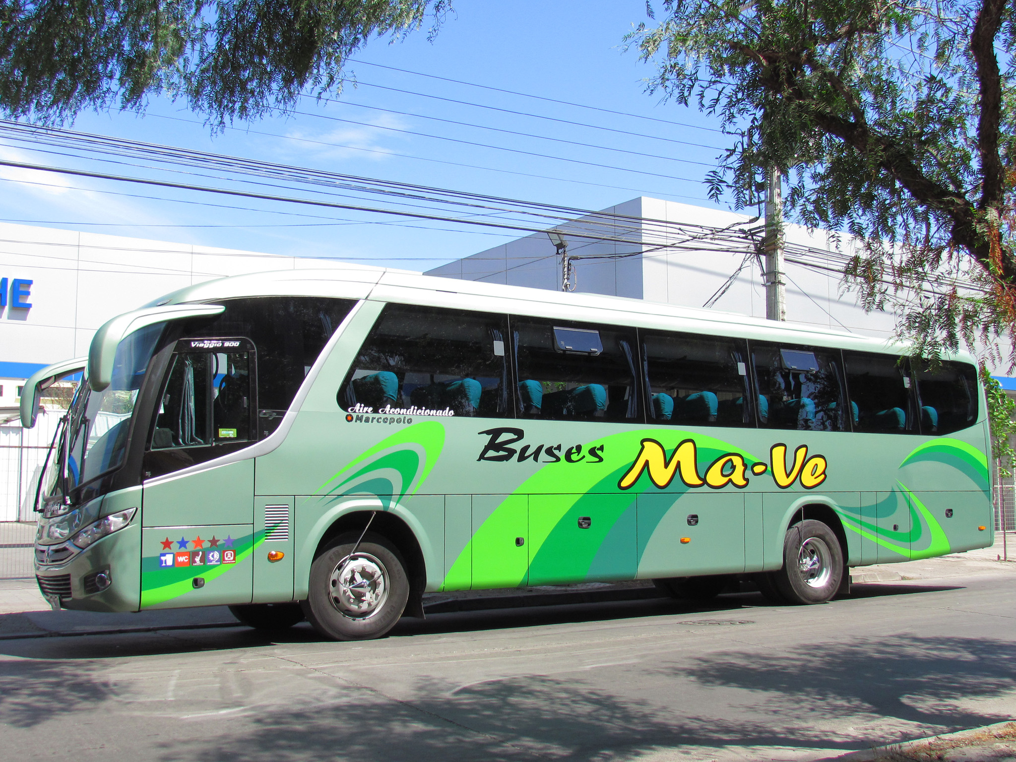 Mercedes Benz O 500